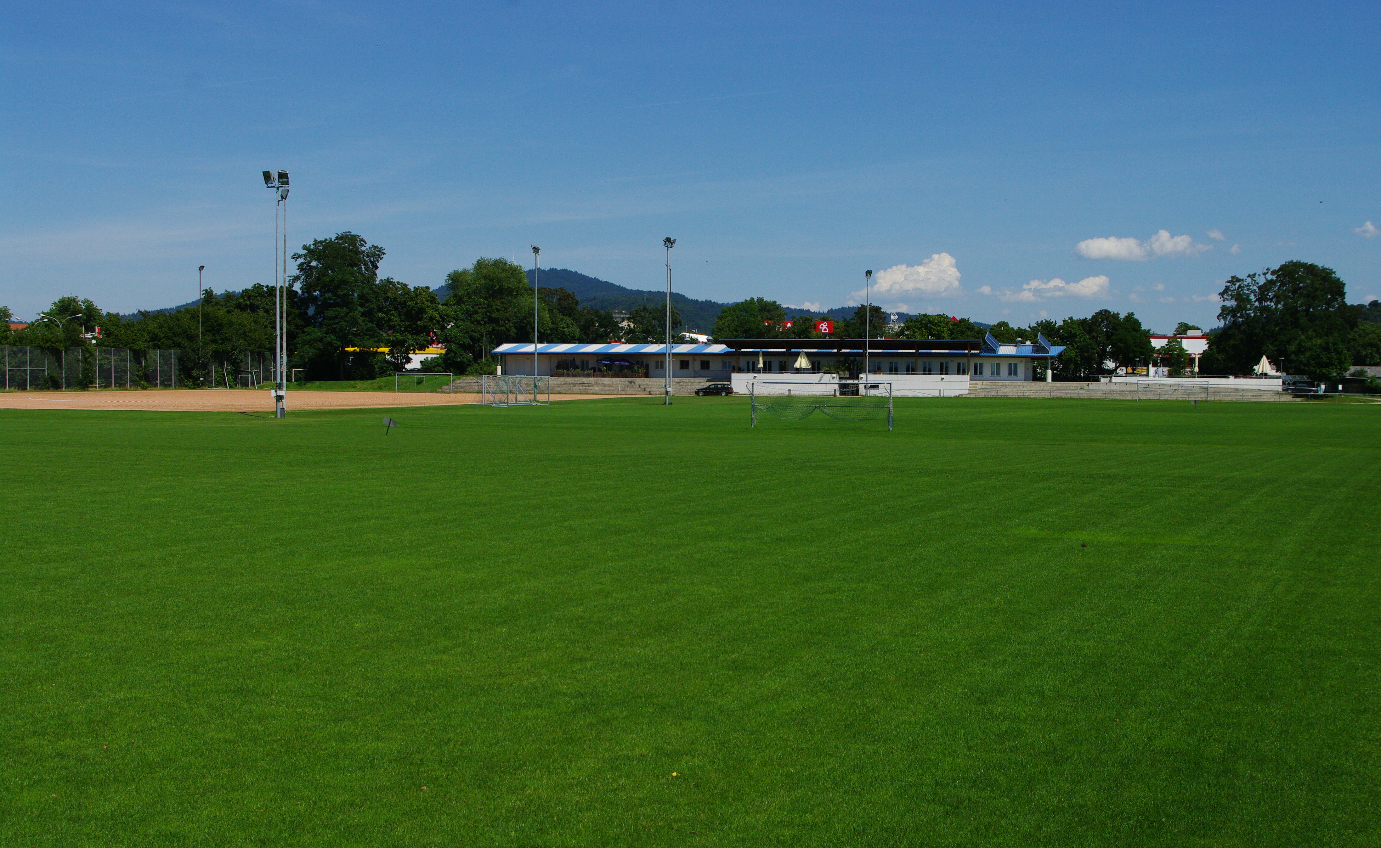 Das Schönbergstadion in Freiburg im Breisgau